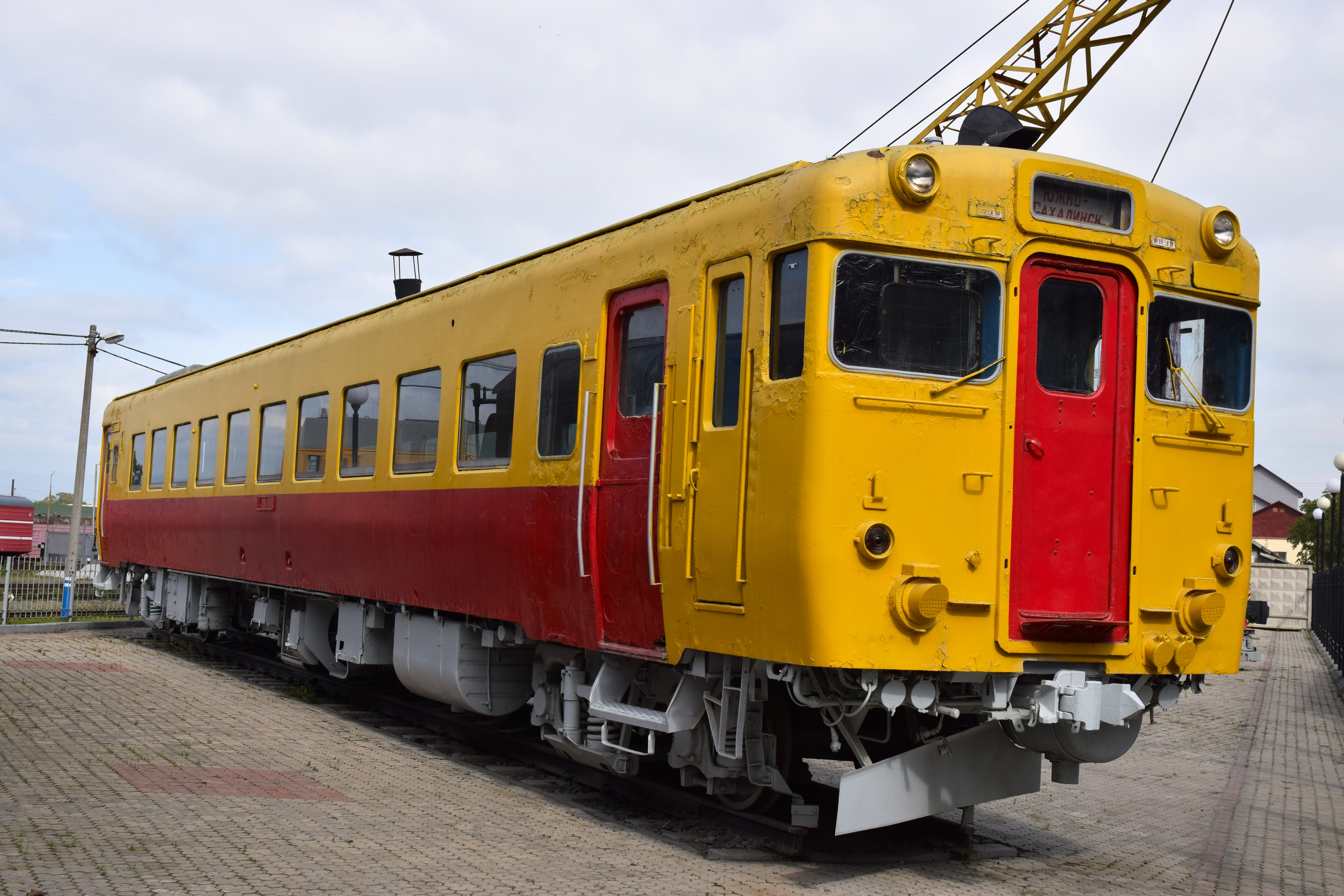 Японский вагон на Сахалине